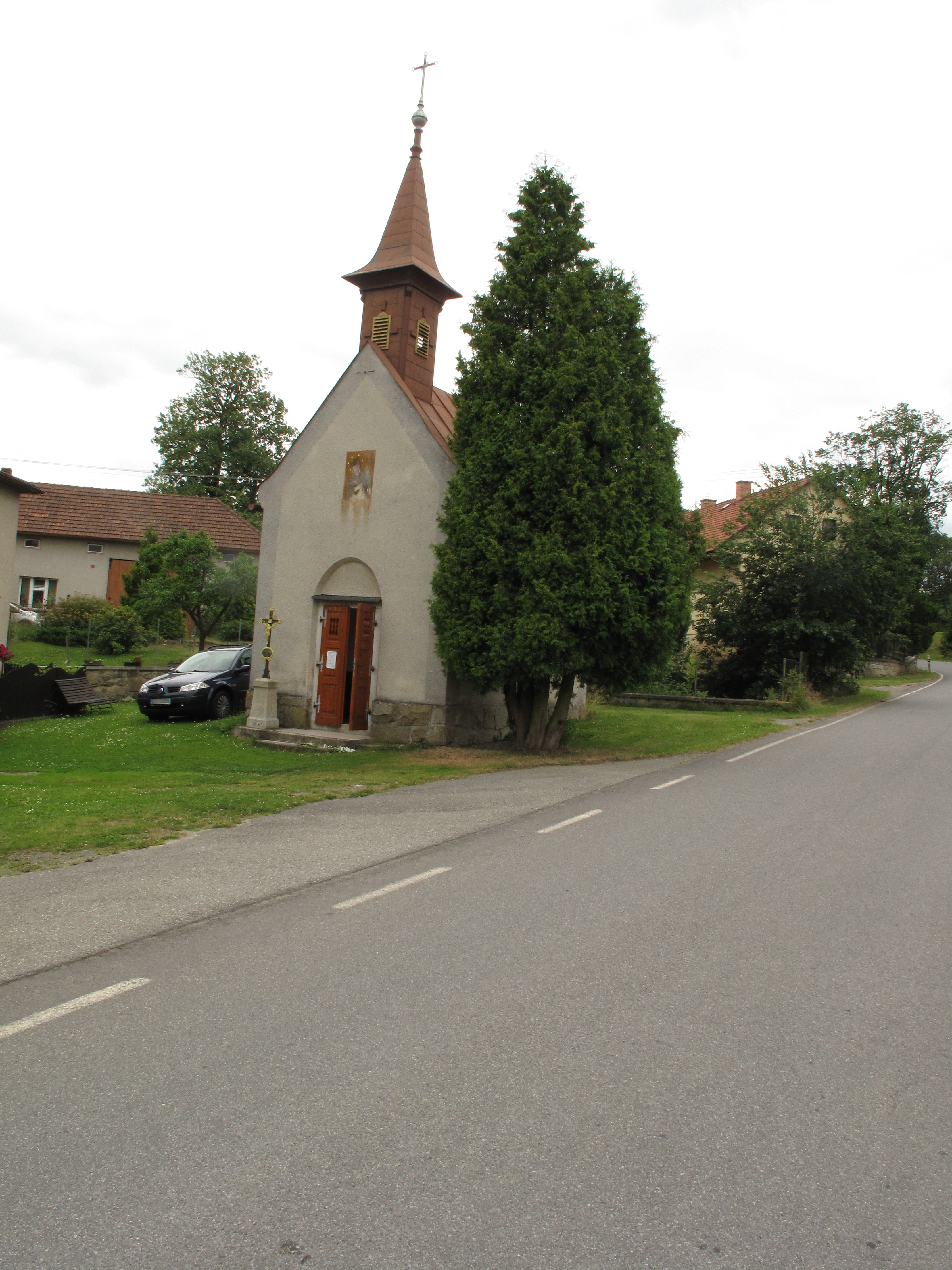 Kaplička v Řeženčicích. Okres Pelhřimov, Česká republika.